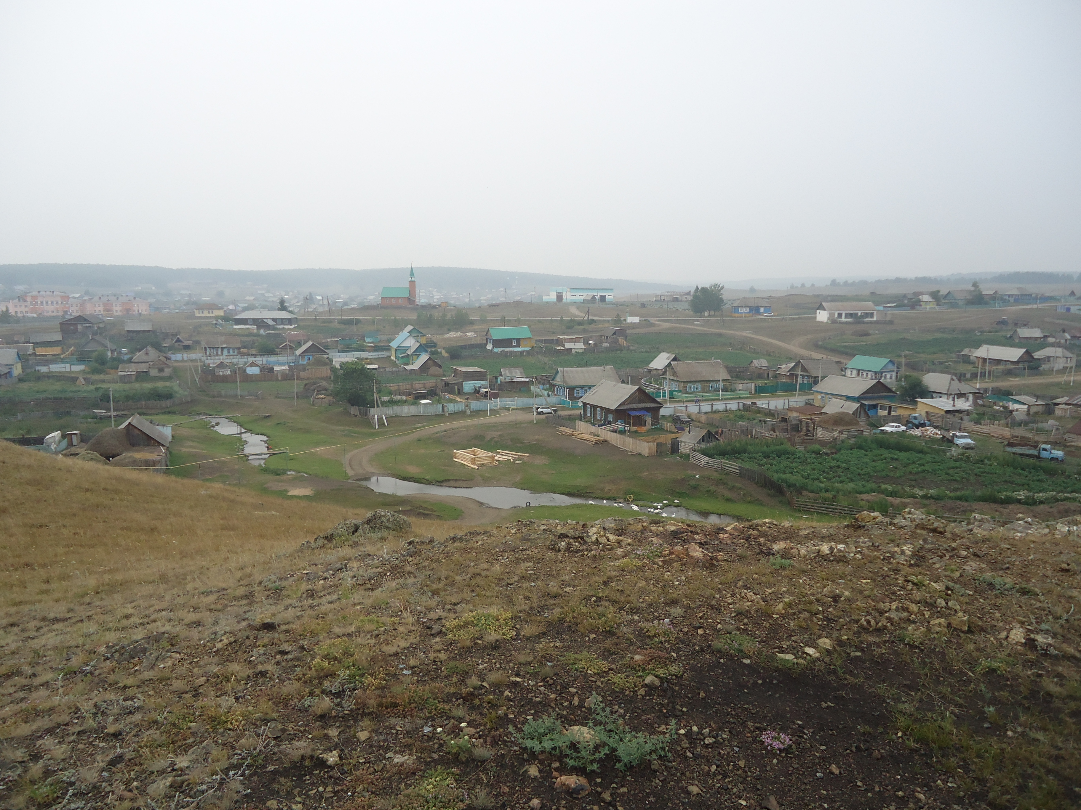 Башҡортса: Икенсе Этҡол ауылы. Ауыл мәсете.